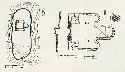 Planul fortificatiei din Cisnadioara.